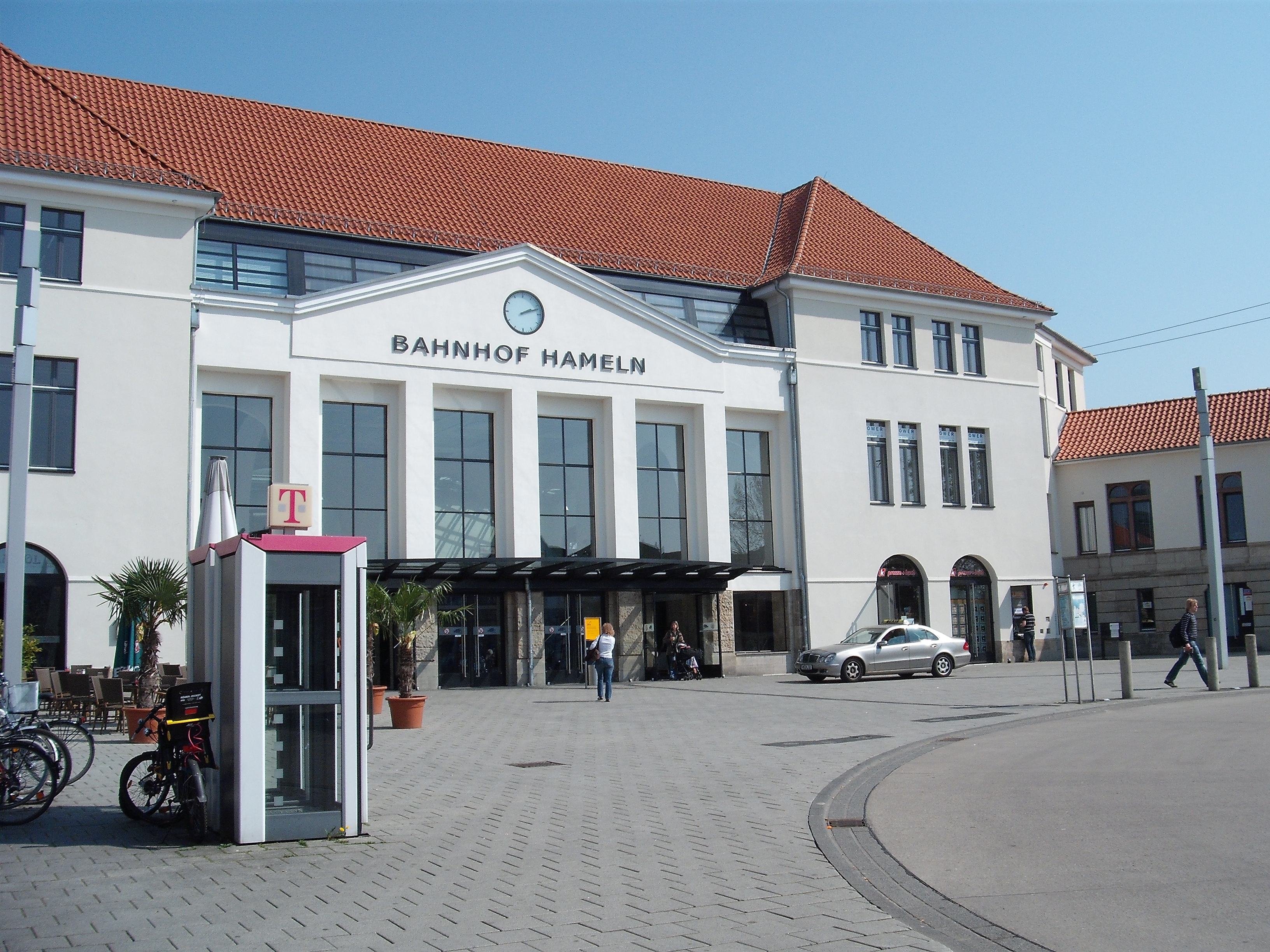 hameln Bahn Hof